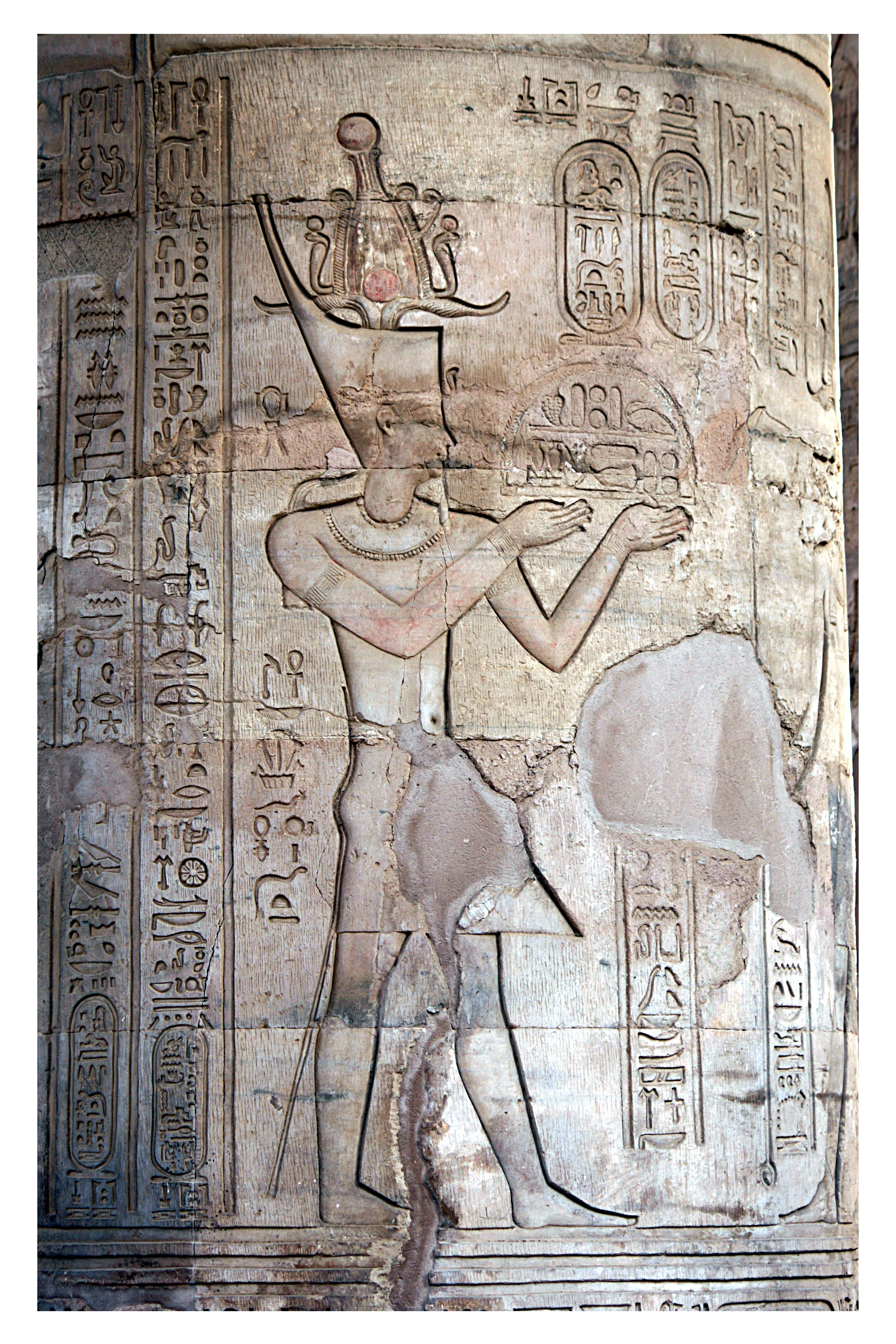 Tempel von Kom Ombo. Ptolemy XII Auletes.